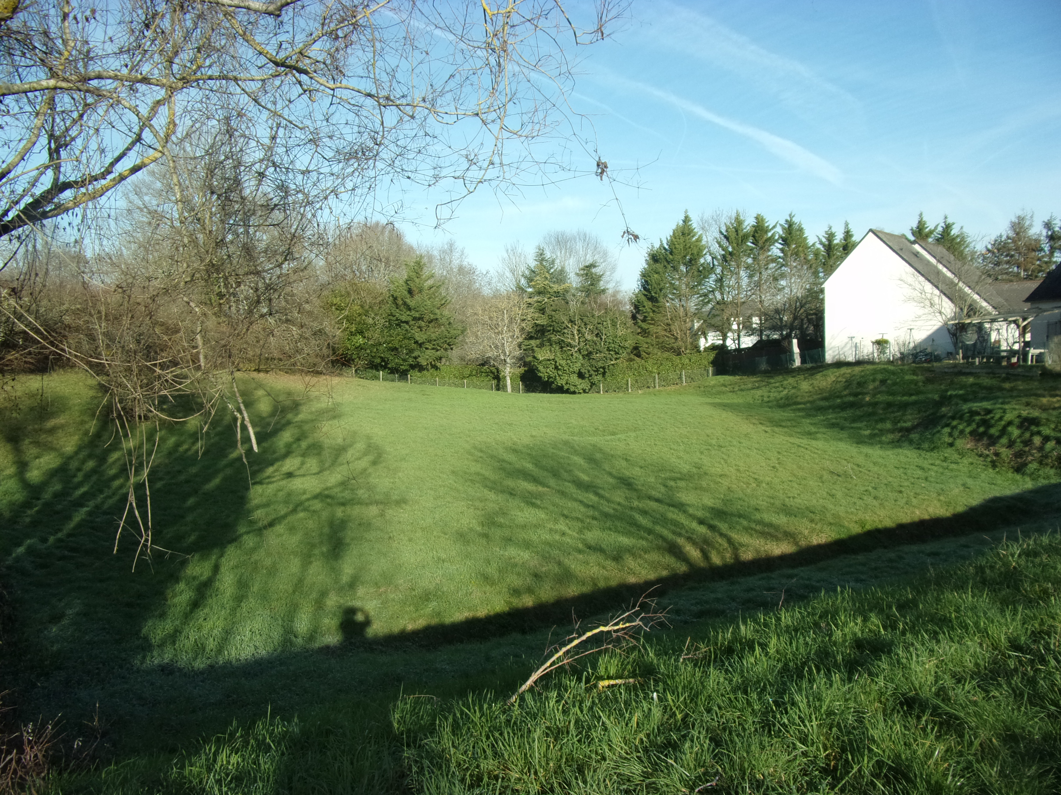 Fossé du rempart gaulois des Châteliers (Amboise). Vue vers le nord